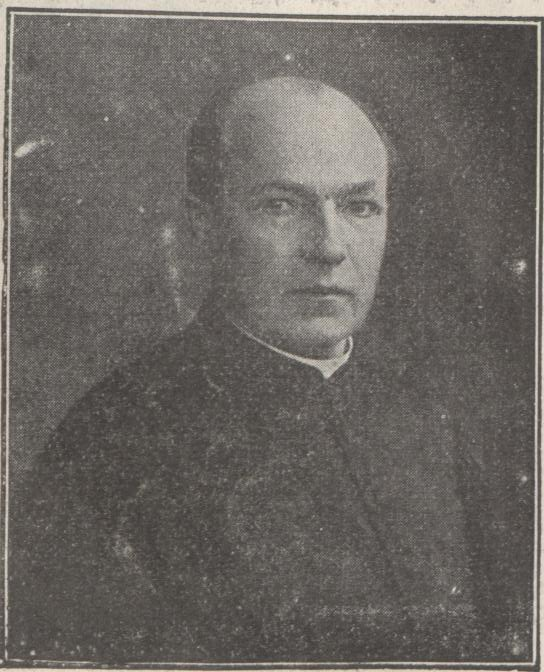 Bischof Dr. Aloys Schäfer, Apostolischer Vikar von Sachsen